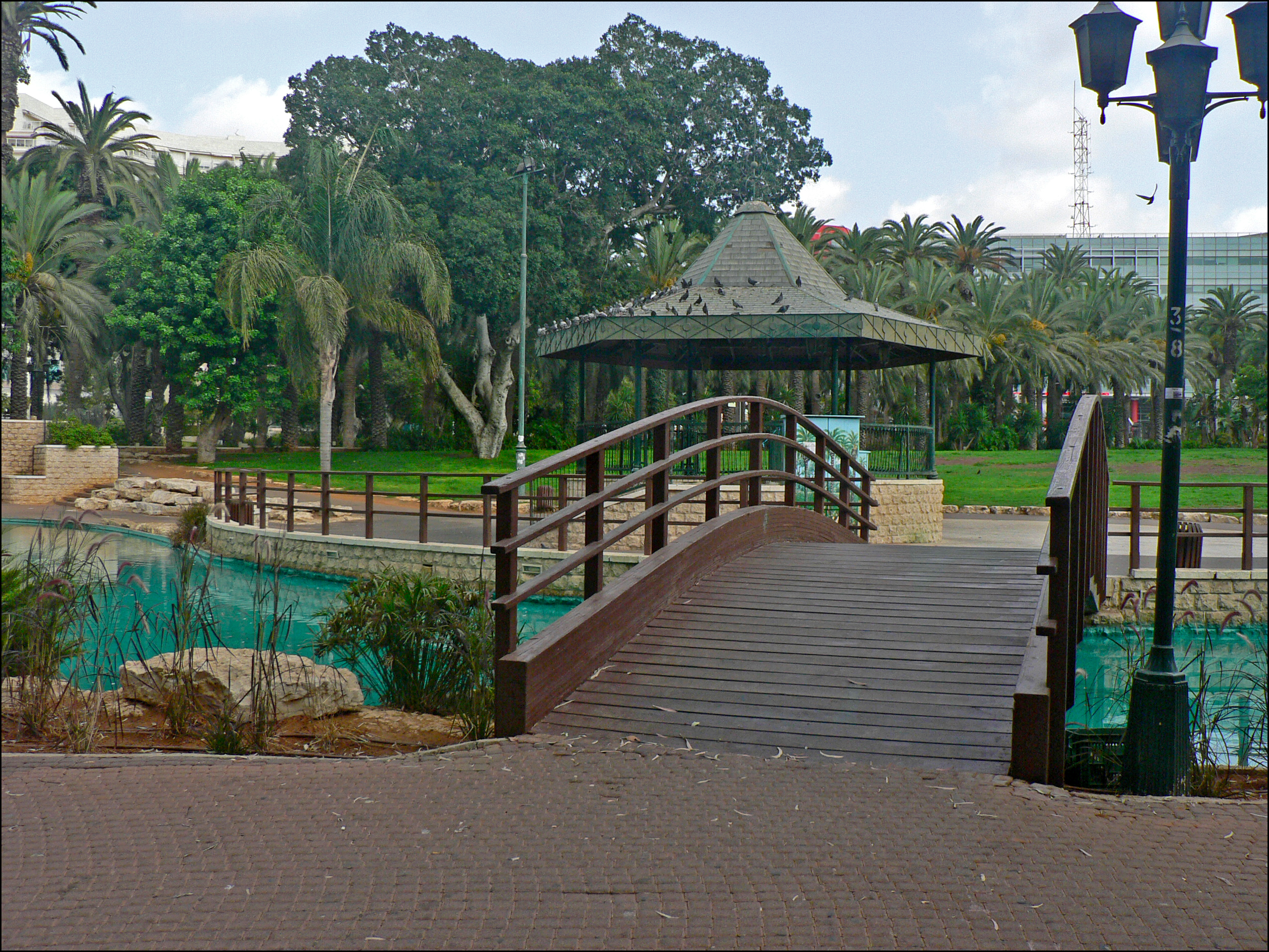 Rishon LeZion Village Park גן המושבה - ראשון לציון